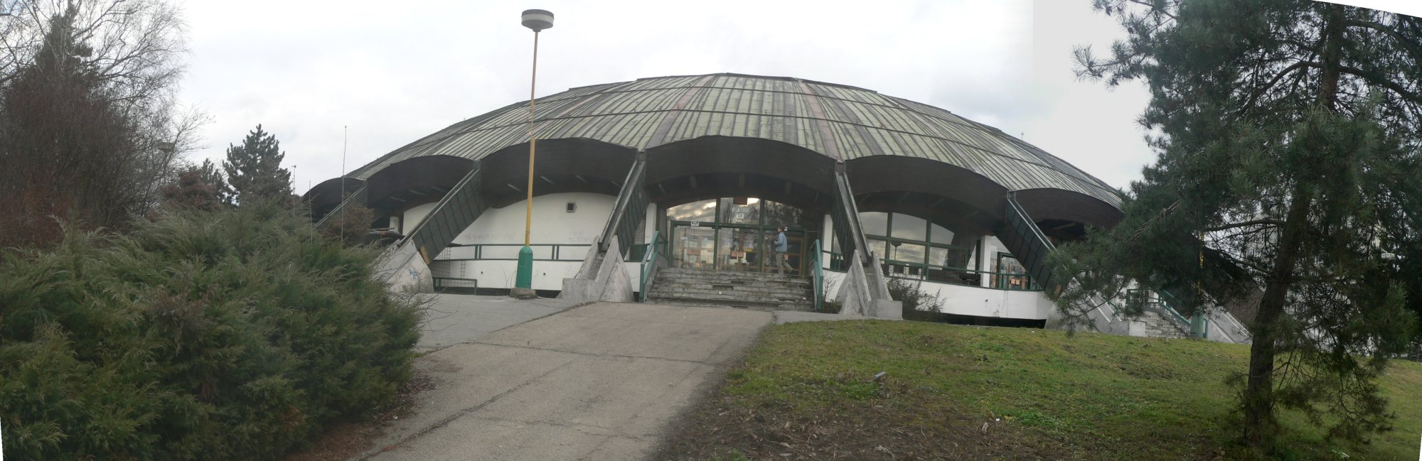 Sport hall in Zilina, Slovakia